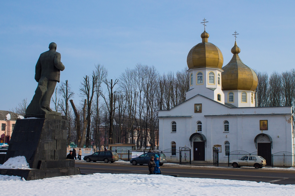 Крычаў. Цэнтр. Уваскрасенская царква